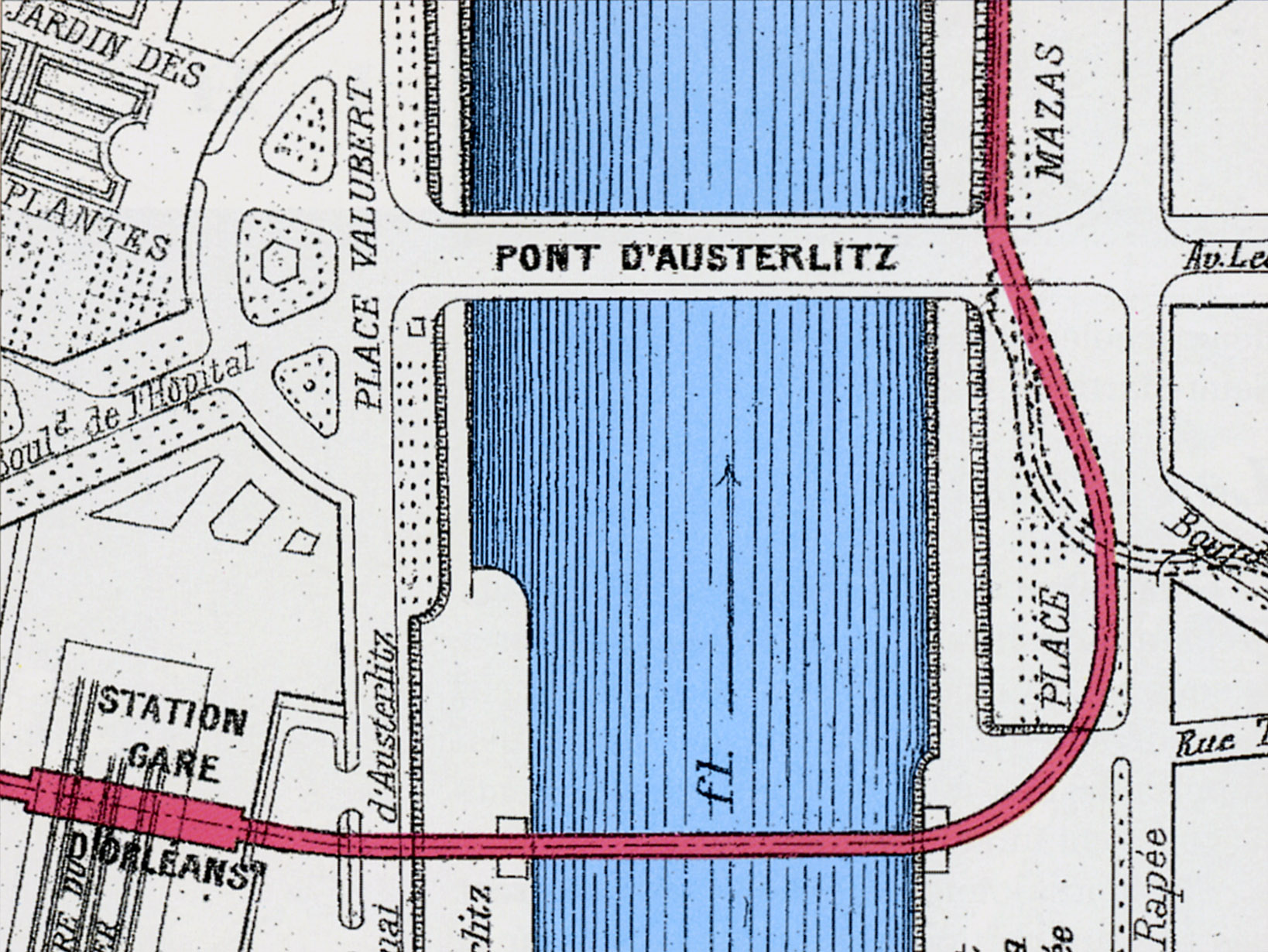 Tracé d'approche du viaduc d'Austerlitz sur la ligne 5 du métro de Paris, France. A droite, on distingue le raccordement avec la ligne 1 - ou voie des Finances - vers Gare de Lyon.